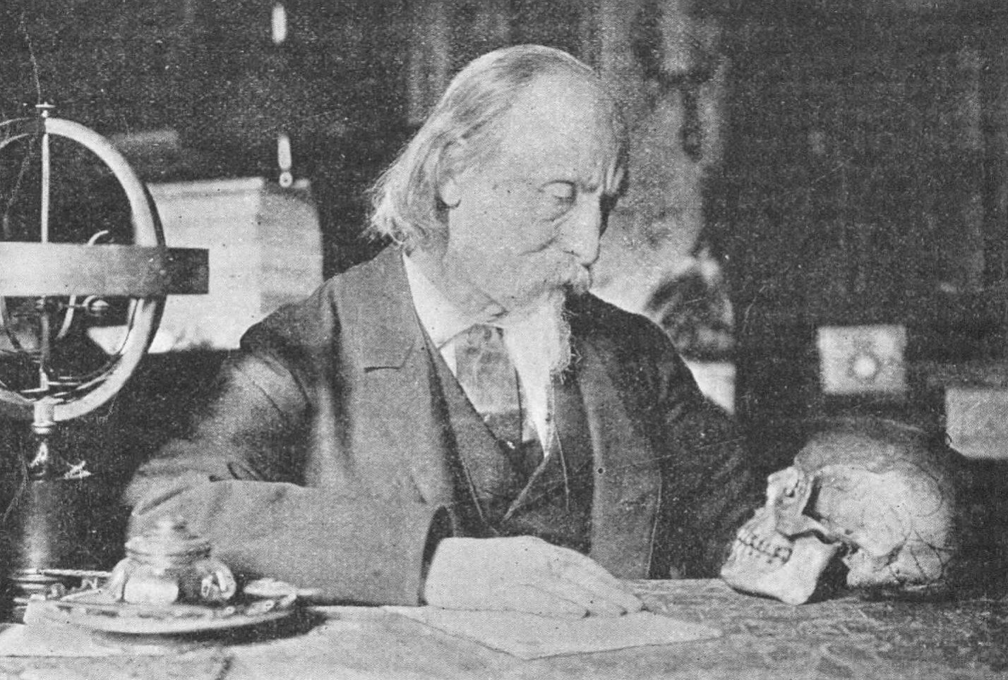 "Un physionomiste moderne : Eugène Ledos".